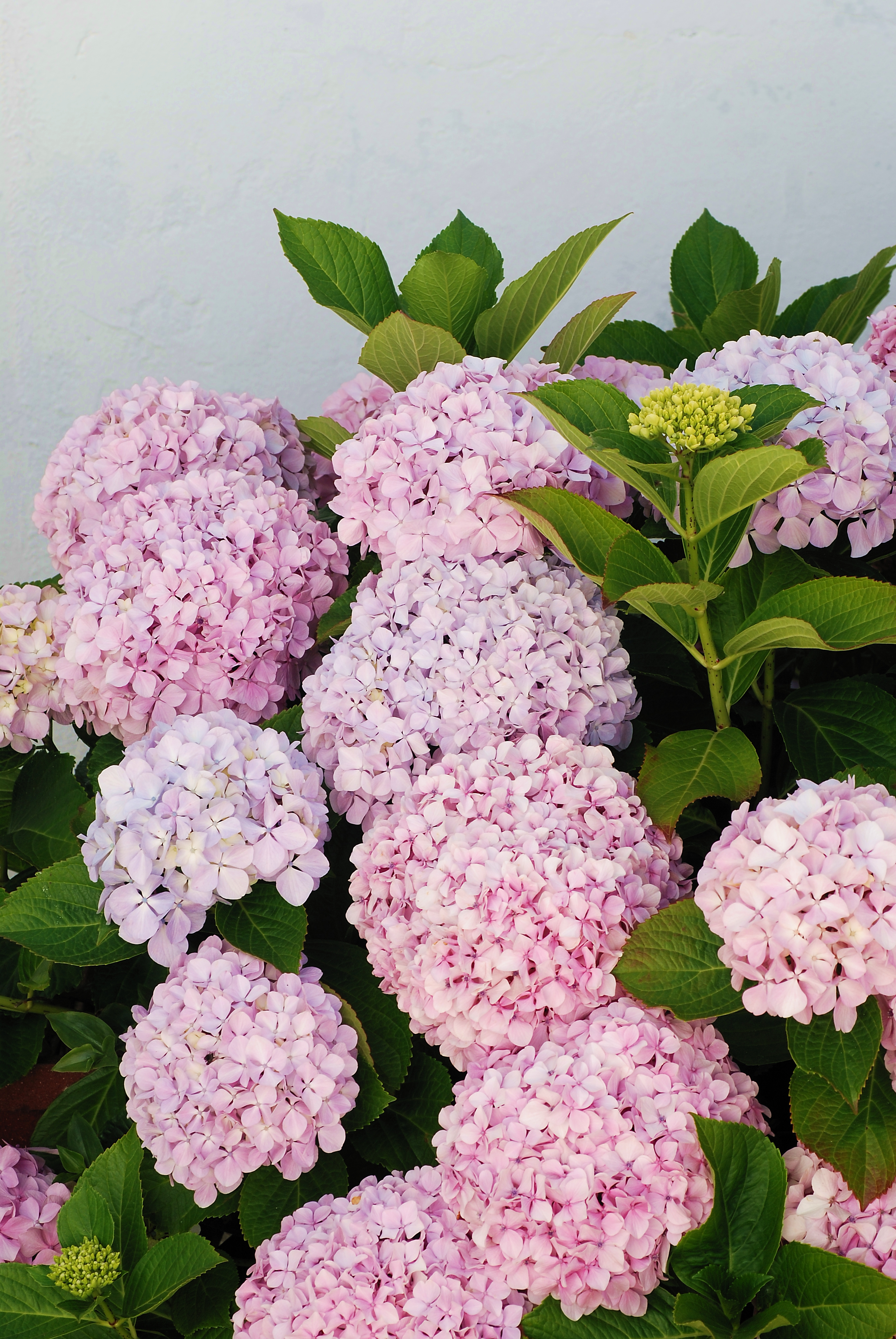 Hydrangea macrophylla (Bigleaf Hydrangea, Hortensia)